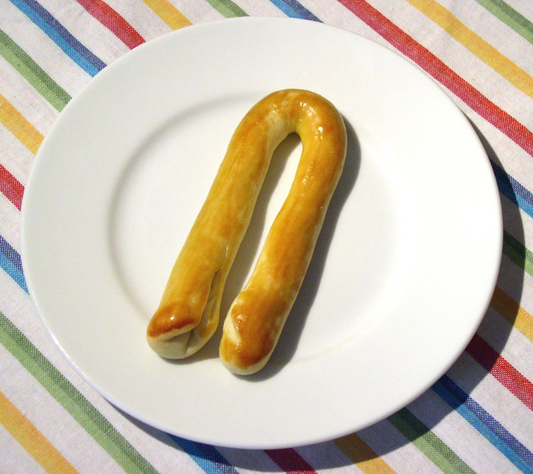 Meitschibei